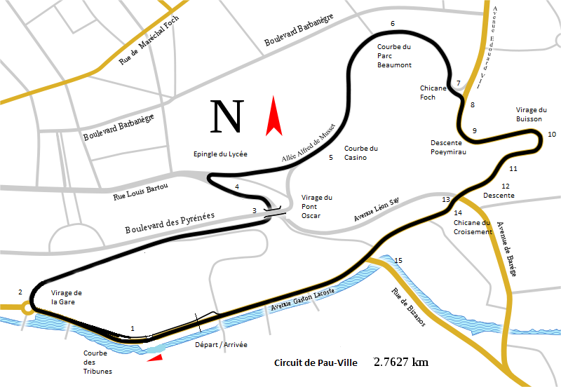 Carte du circuit de Pau (nom des virages, n°)